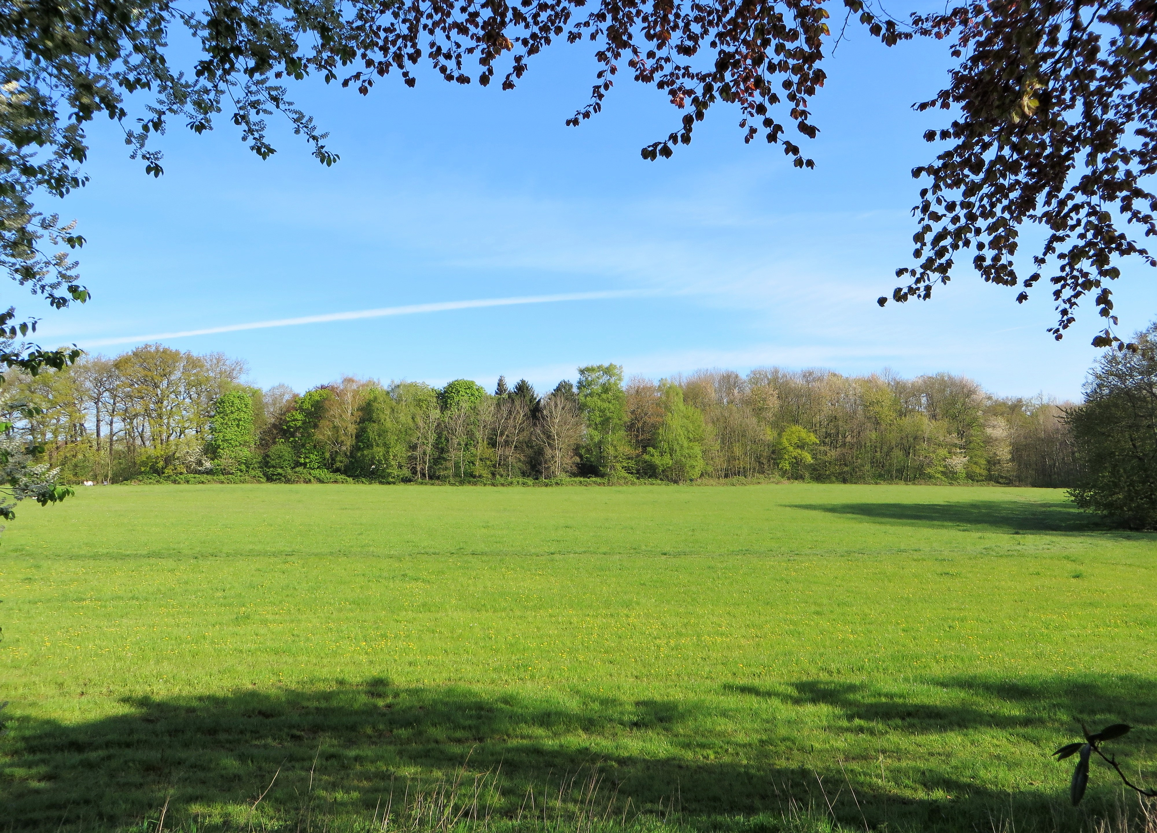 Geschützter Landschaftsbestandteil 1.4.2.36 „Dünningsbruch“ in Hagen, zwischen Berchumer Straße und „Im Dünningsbruch“. Es handelt sich um einen artenreichen Waldbestand (Erlen-Hainbuchenwald) mit Feuchtstellen und einigen Tümpeln.